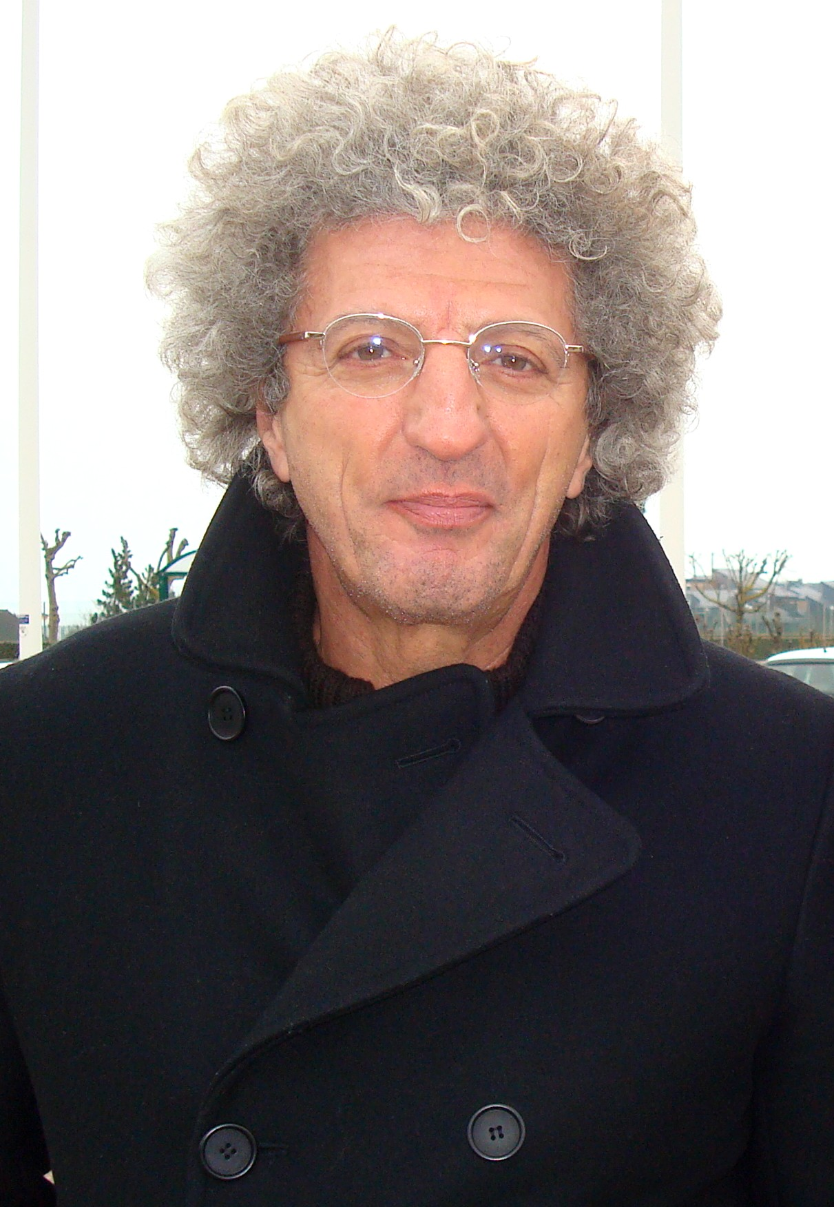 Le réalisateur Elie Chouraqui au festival du film asiatique de Deauville en 2010.